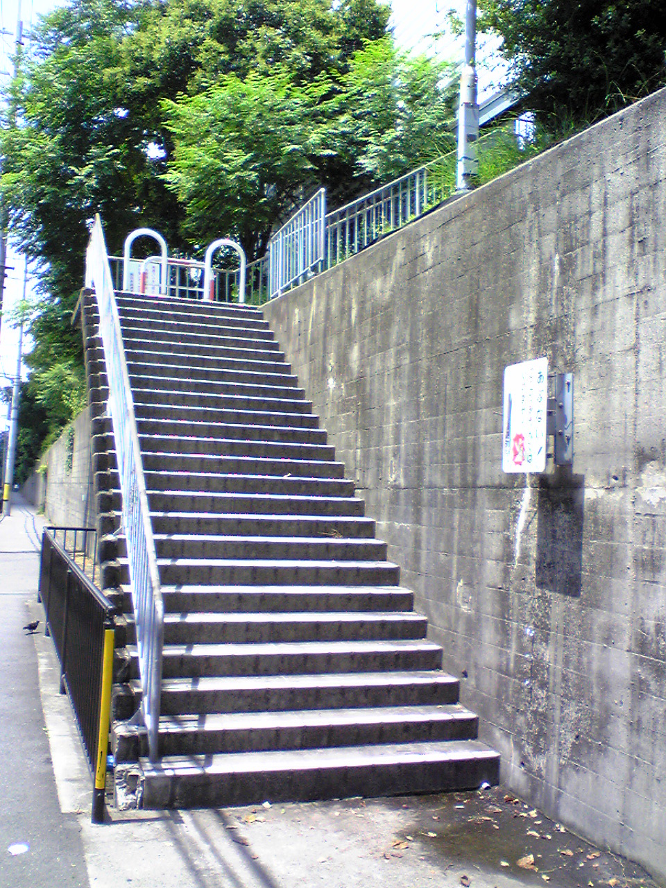 名神ハイウェイバス等が発着する深草バスストップの神戸方面入口階段